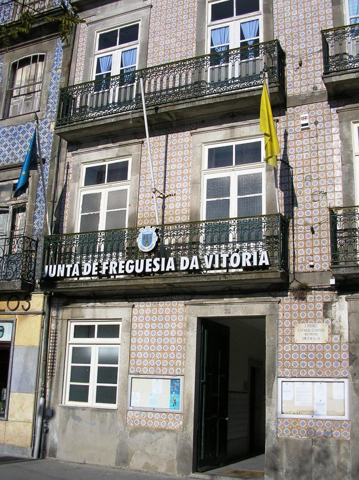 Vitória town hall in Porto, Portugal.